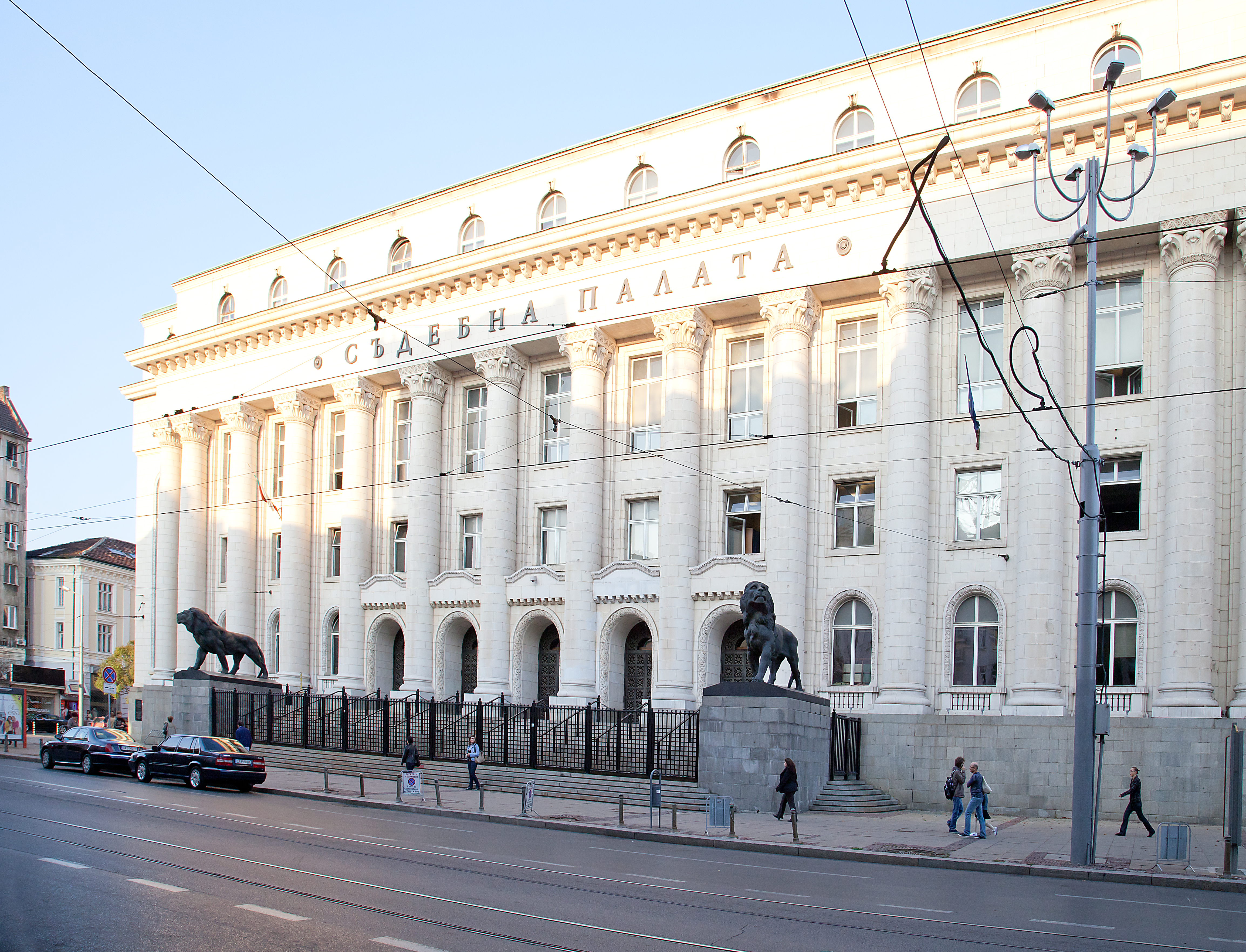 Justizpalast, Sofia